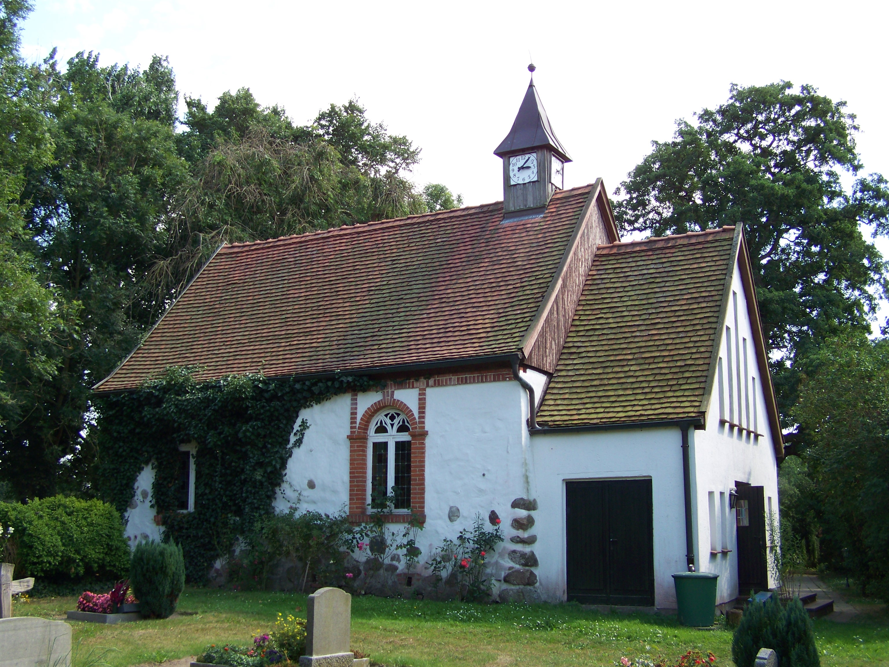 Willerswalde, Nordvorpommern, Kapelle